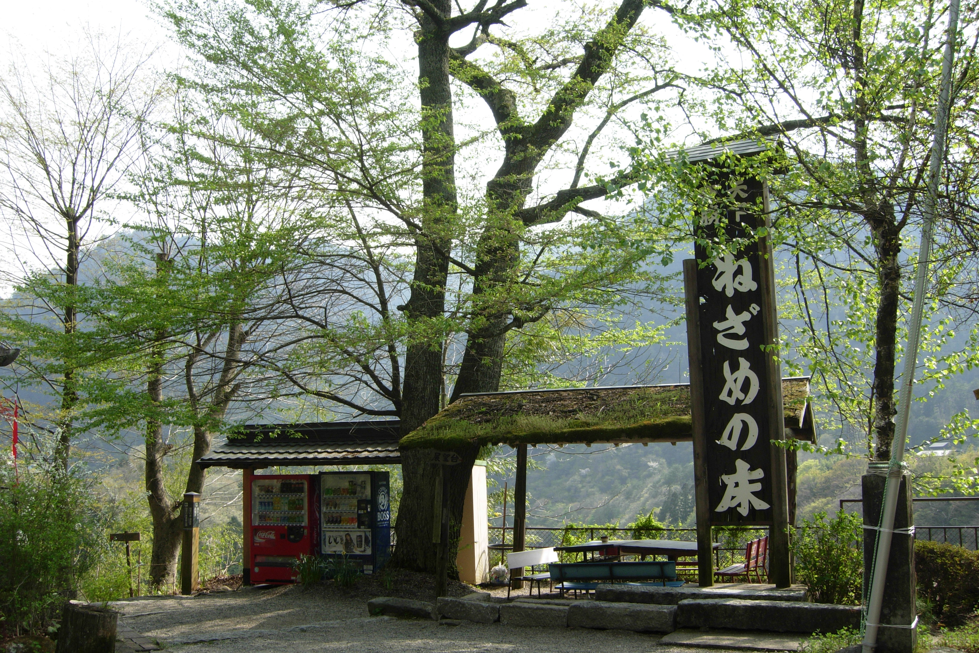 寝覚めの床